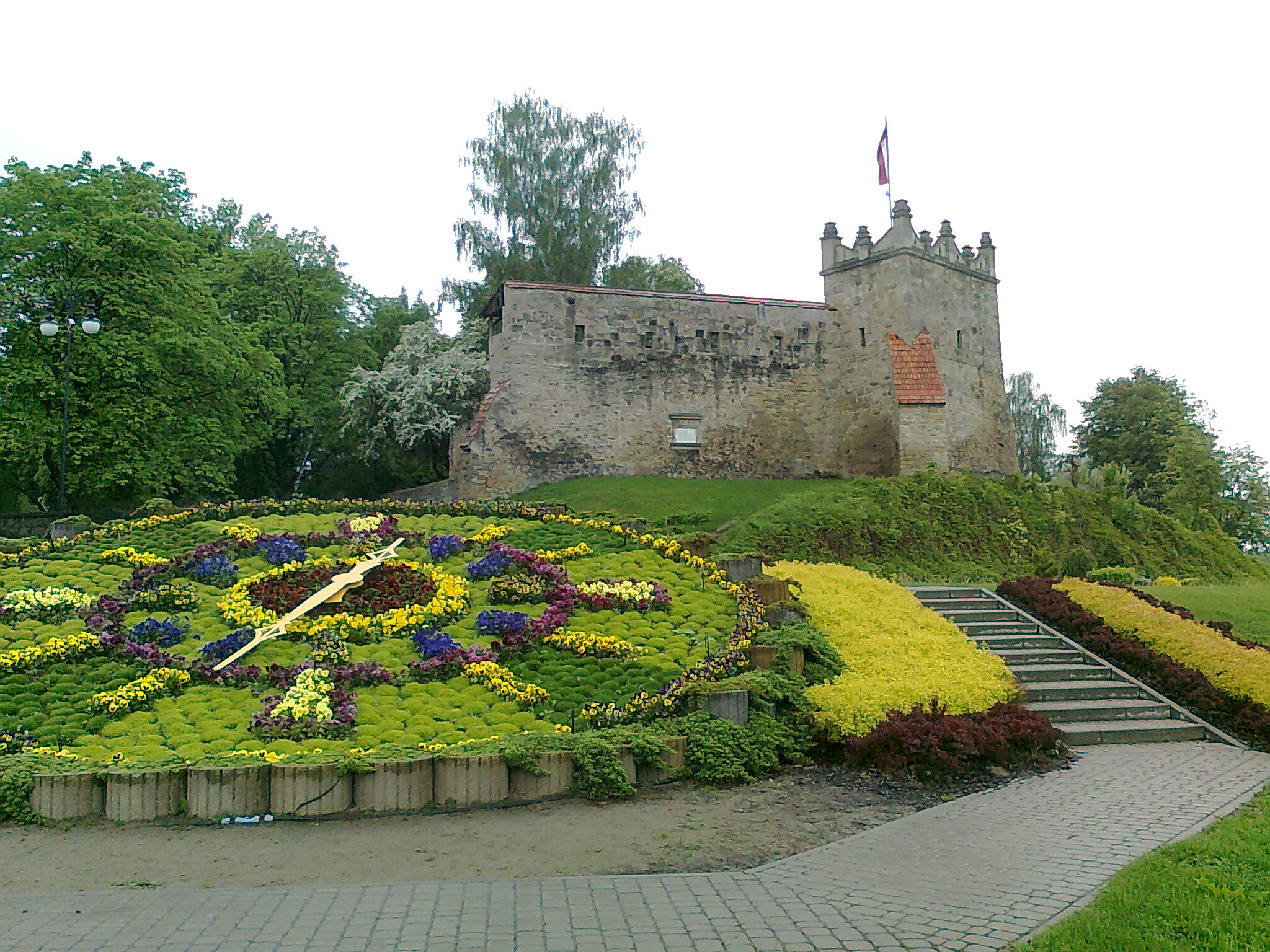 Zamek Królewski w Nowym Sączu.